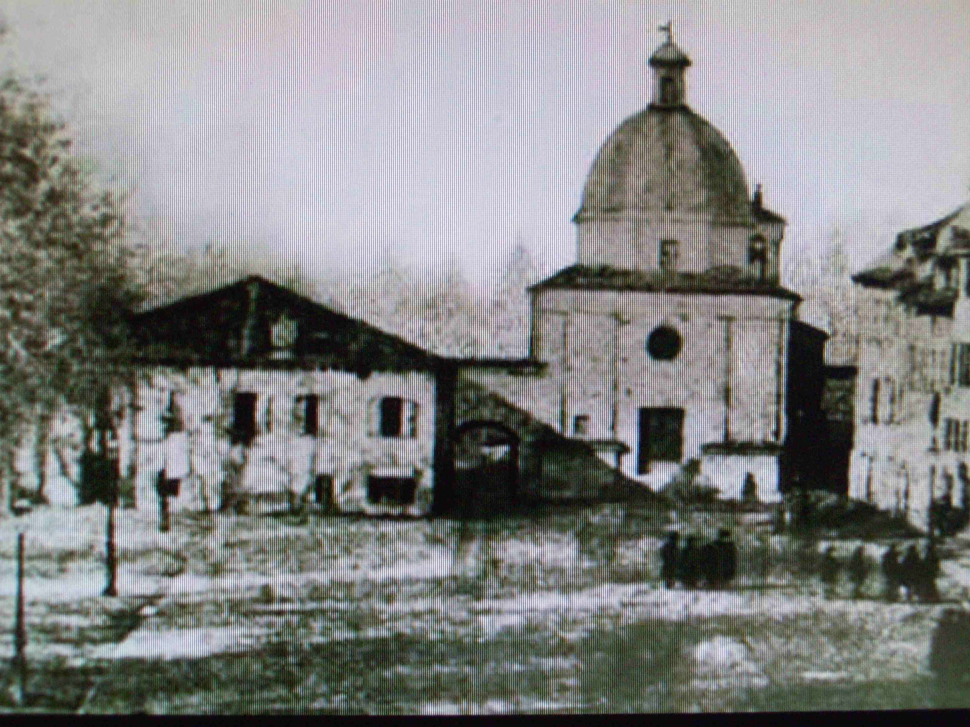 L'Oratorio della Madonnina con a fianco la porta e le mura di Mirandola nel 1868